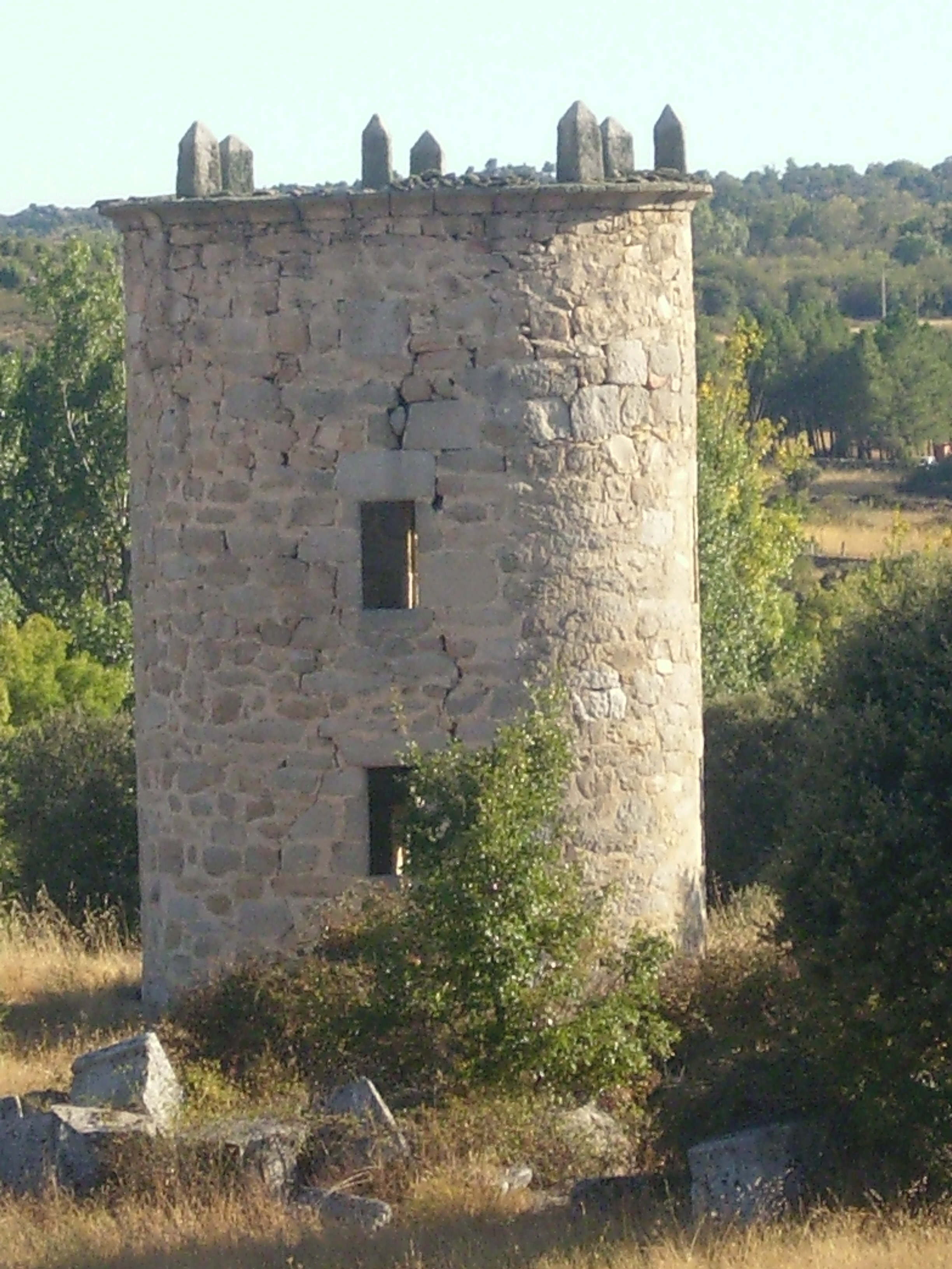 La torre o castillo de Mirabel, que data del siglo XVI, se encuentra en tierras del marquesado de Santillana. Este marquesado tuvo jurisdicción sobre Buitrago y su alfoz, teniendo su frontera con el señorío del Duque de Uceda del que límite estaba en el arroyo Jóbalo. Esta frontera fue motivo de no pocas disputas, siendo un factor determinante la construcción de un puesto de vigilancia que protegiese las dehesas. Este puesto de vigilancia debió ser la torre de Mirabel dadas las características de su construcción incluido el blasón que adorna la puerta de acceso, que no se corresponde con el linaje de ningún colectivo. La intencionalidad de su estructura en forma de torre tendría más bien un carácter disuasorio ante los furtivos y ladrones dando cobijo a los guardas de la propiedad.